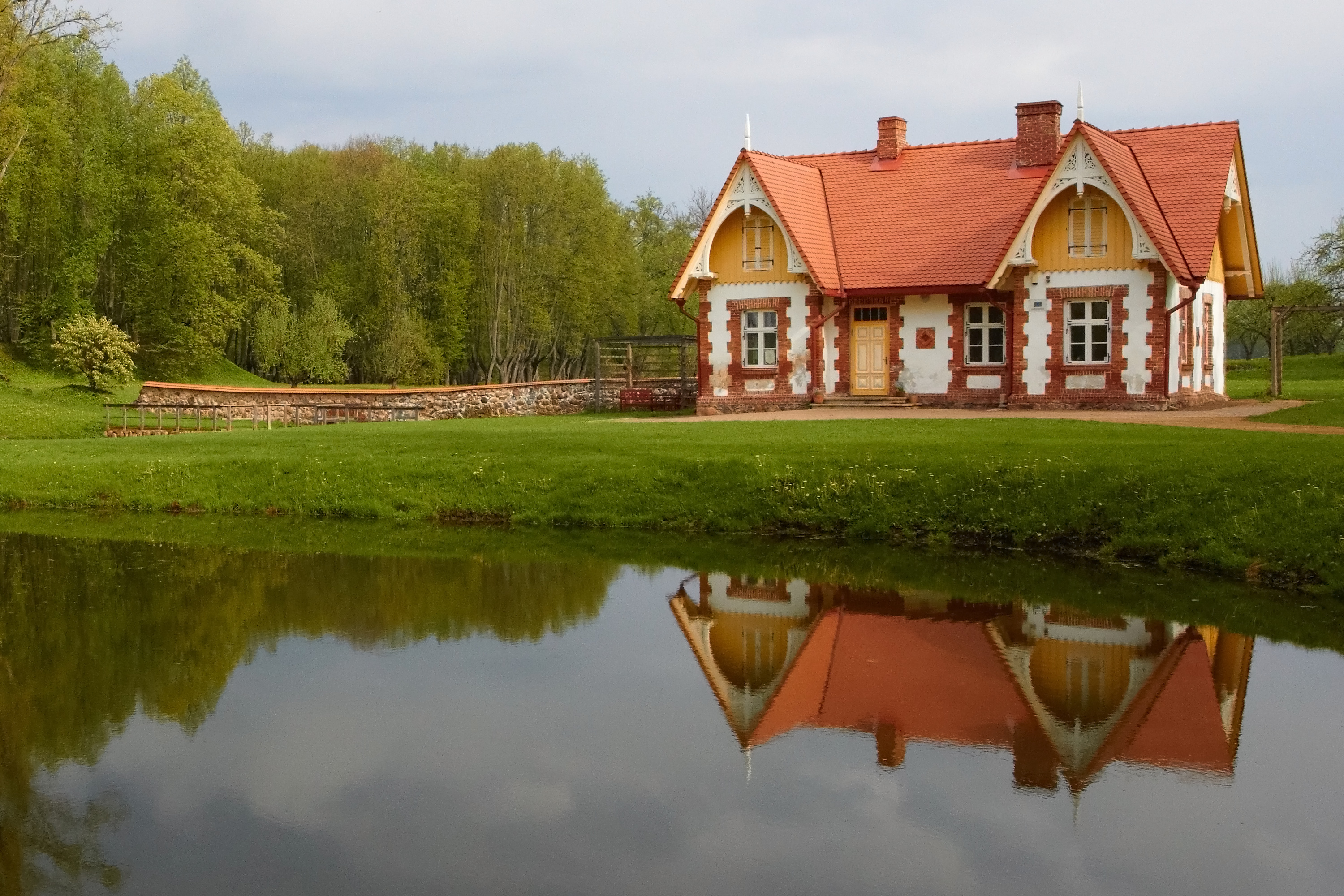 Luke mõisa kärnerimaja